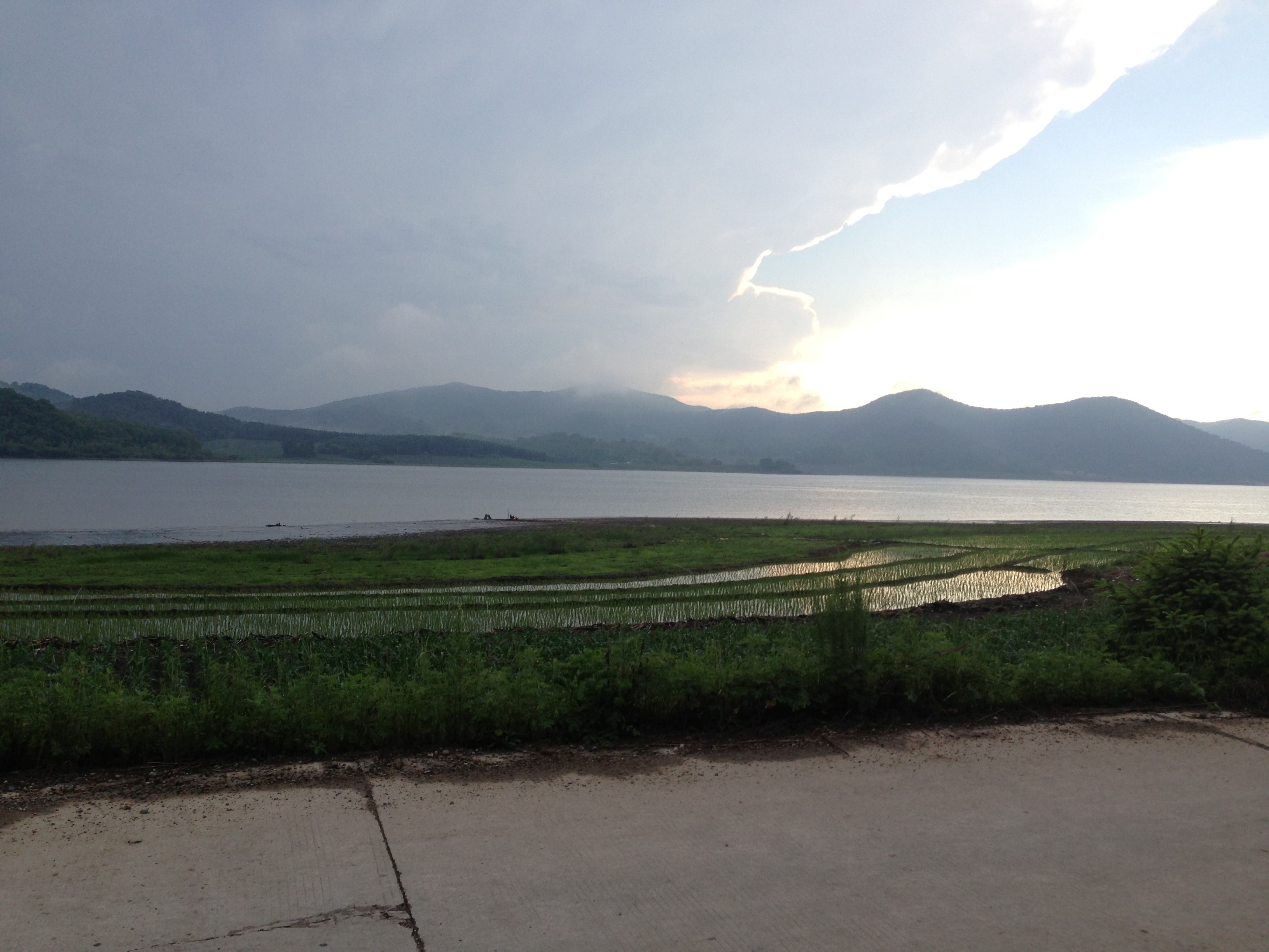 Chuanying, Jilin, China